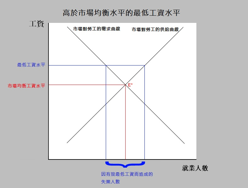 中文（香港）: 最低工資對市場供給的影響